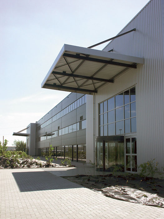 De Expodroom, gelegen te Bree, Limburg, België.